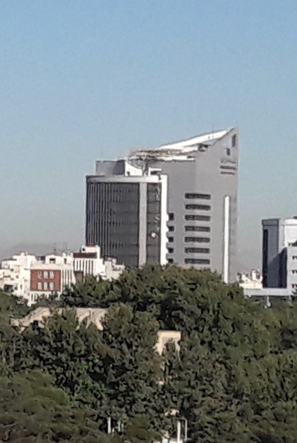 برج بانک صادرات مشهد